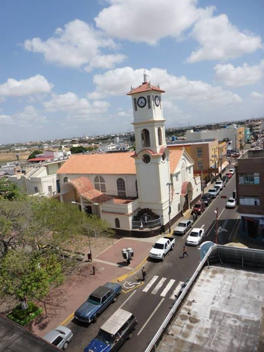 iglesia en Punto Fijo